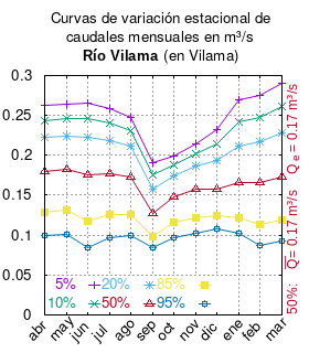 Curva de Variación Estacional del río Vilama en Vilama. # cita publicación # | apellido = Dirección General de Aguas # | nombre = # | enlace-autor = Ministerio de Obras Públicas (Chile) # | título = Diagnóstico y clasificación de los cursos y cuerpos de agua según objetivos de calidad. Cuenca Salar de Atacama. # | ubicación = Santiago de Chile # | editorial = Ministerio de Obras Públicas (Chile) # | año = 2004 # | edición = # | url = # | urlarchivo = # | fechaarchivo = # | ref = harv # Tabla 4.2 (m3/s) pág. 28 mes 5% 10% 20% 50% 85% 95% abr 0.262 0.244 0.222 0.180 0.129 0.099 may 0.264 0.246 0.224 0.182 0.131 0.101 jun 0.266 0.246 0.222 0.176 0.118 0.085 jul 0.258 0.240 0.219 0.177 0.126 0.097 ago 0.248 0.231 0.211 0.173 0.126 0.099 sep 0.191 0.175 0.157 0.127 0.098 0.085 oct 0.199 0.188 0.174 0.148 0.116 0.097 nov 0.214 0.202 0.187 0.158 0.122 0.102 dic 0.232 0.214 0.193 0.158 0.124 0.108 ene 0.269 0.242 0.212 0.166 0.122 0.102 feb 0.275 0.248 0.217 0.166 0.113 0.087 mar 0.291 0.261 0.228 0.173 0.119 0.092 This plot was created with Gnuplot.